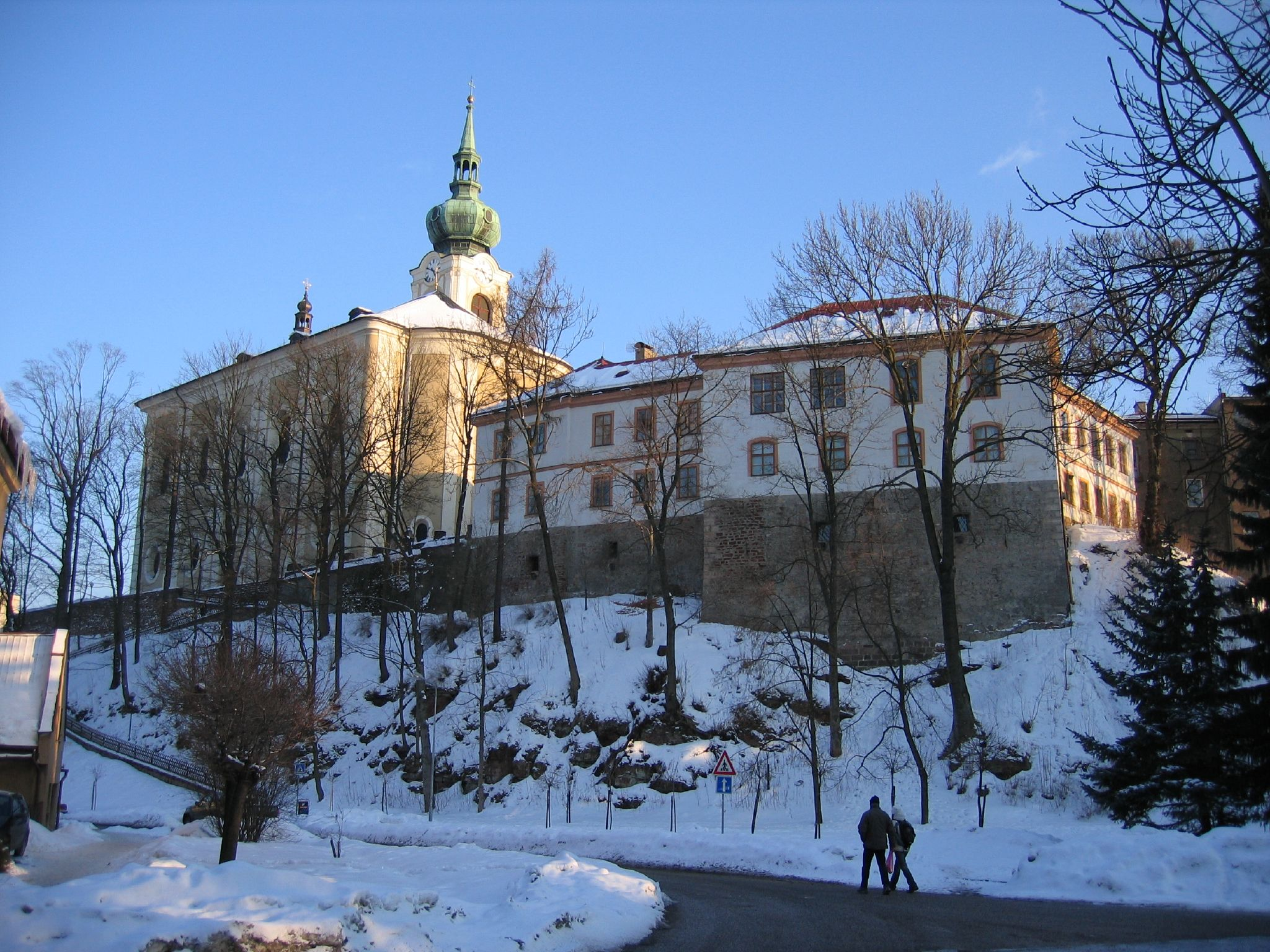 Trutnov, Czech Republic